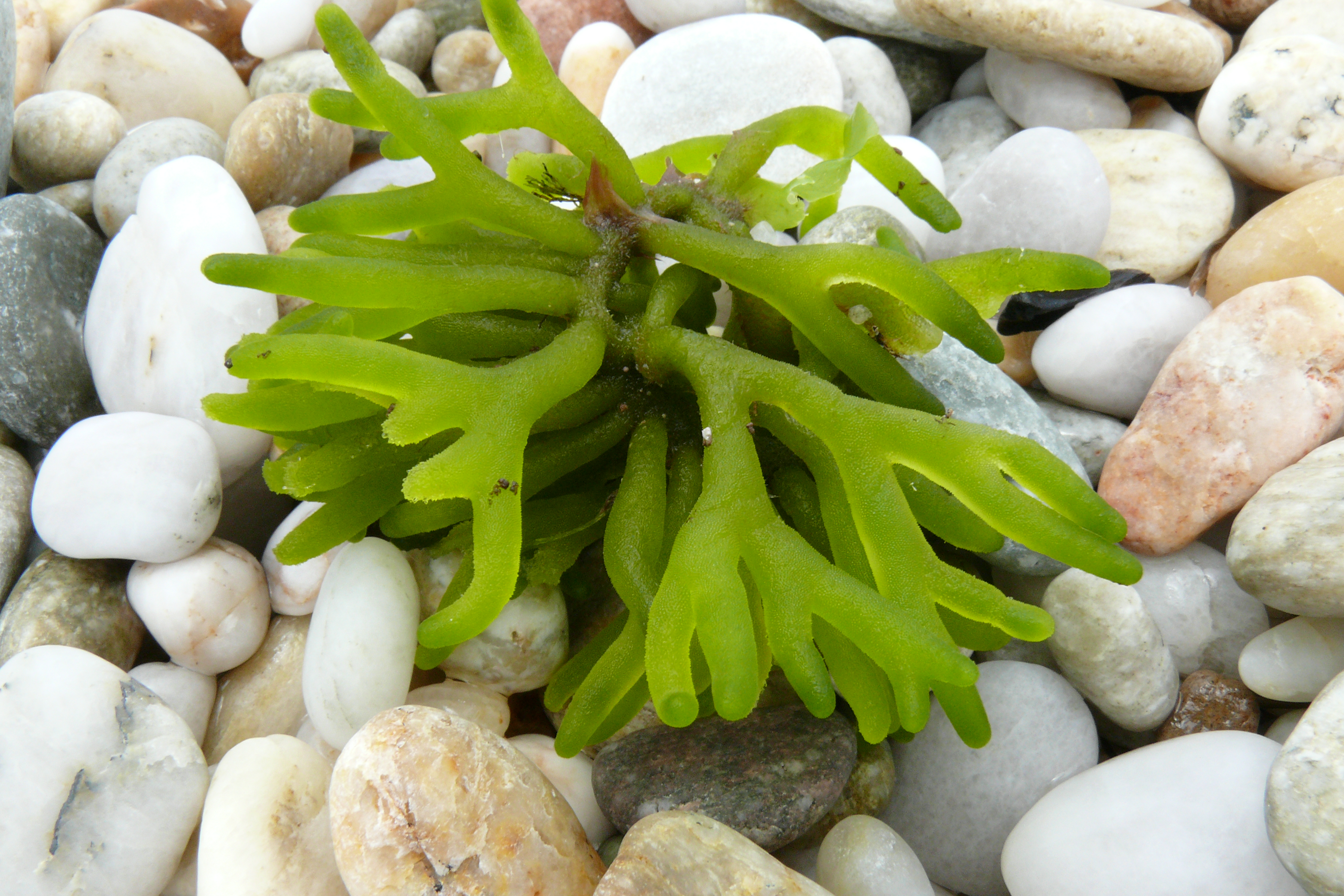 hochgeladen zur Bestimmung Codium (probably Codium fragile)